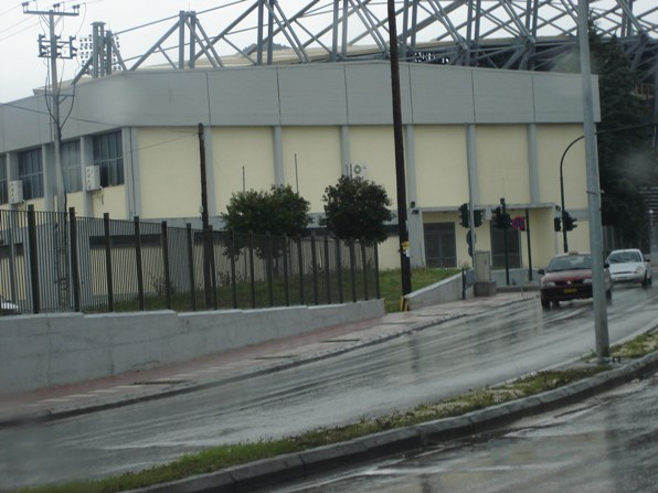 Palai de Spor Patras "Pampeloponisiako"